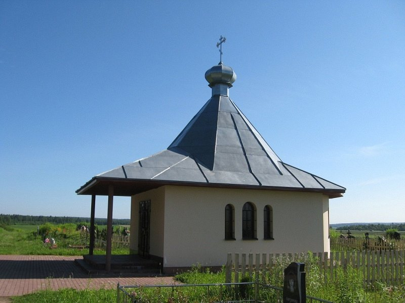 Паўлаўшчына. Капліца ў гонар Святой Сафіі Слуцкай